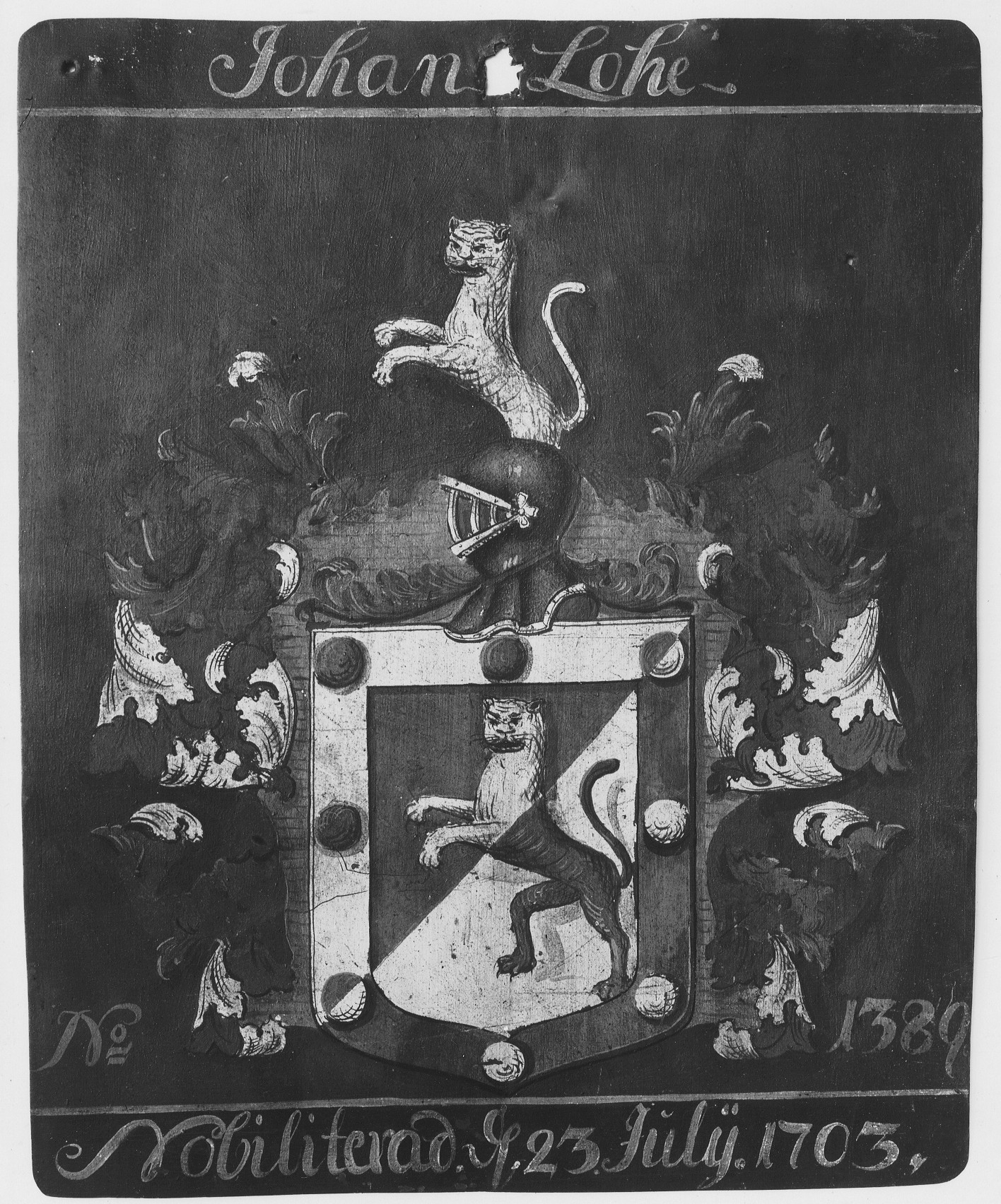 Loheska vapnet i Riddarhussalen